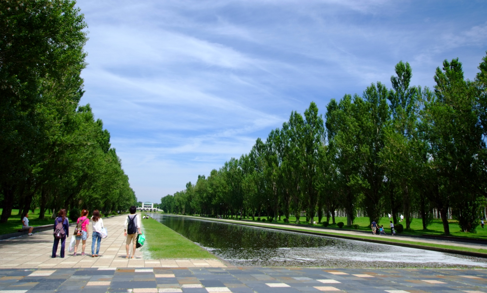 前田森林公園（Ｍaeda forest park）